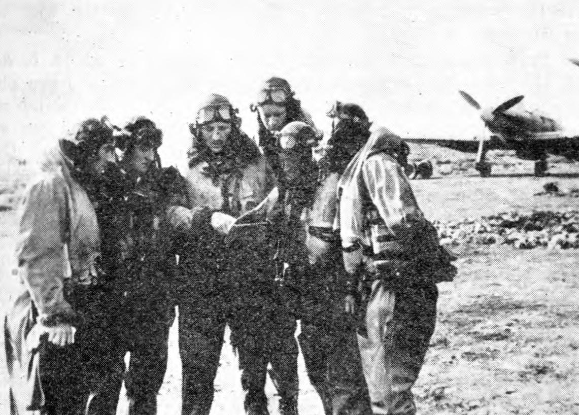 Piloti Druge lovske eskadrilje se posvetujejo pred borbenim poletom. V sredini Branivoj Majcen.